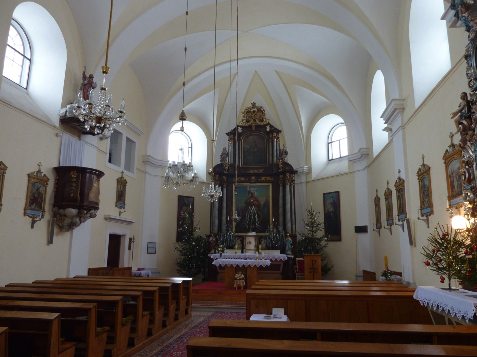 Interiér římskokatolického kostela